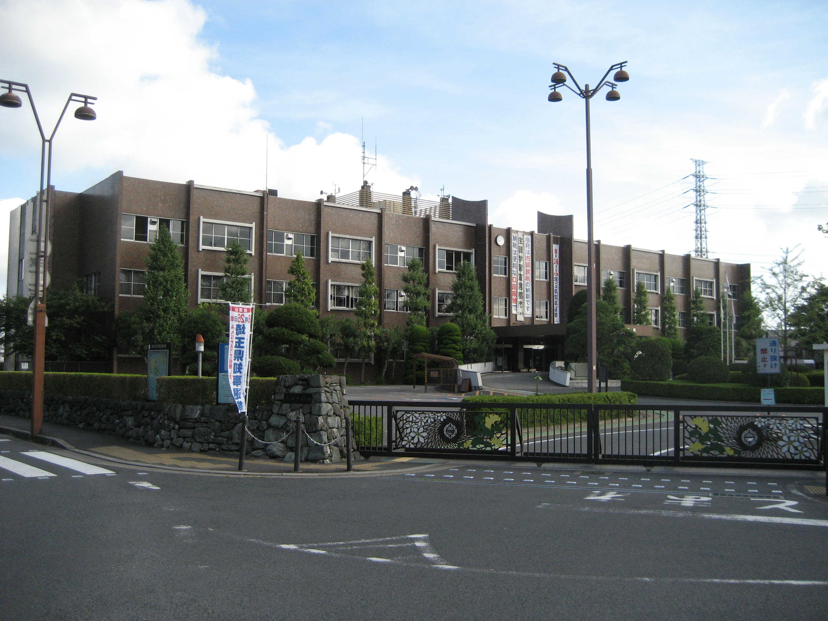 八潮市役所正面